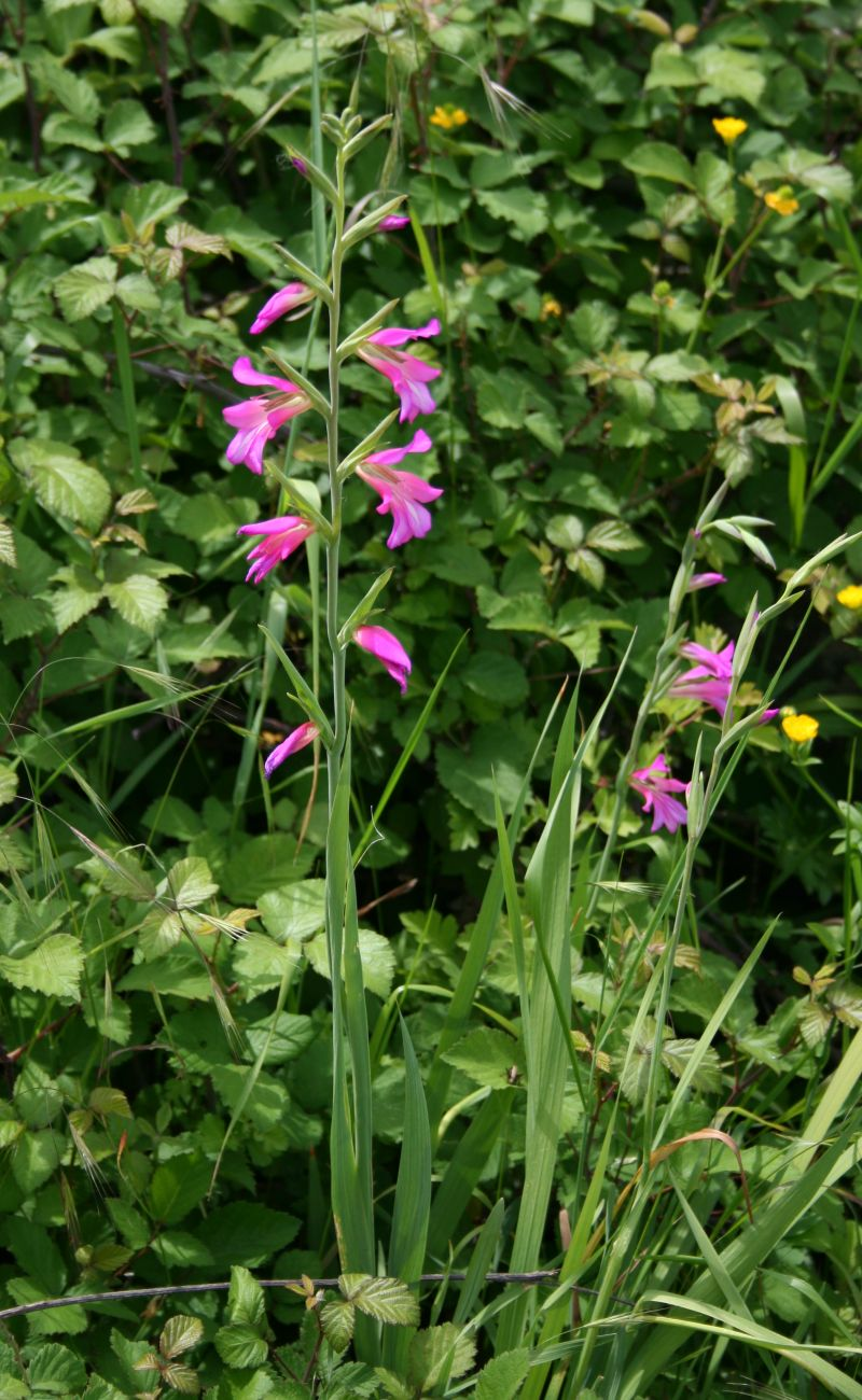 Gladiolus italicus, Schwertliliengewächse (Iridaceae) - Italien/Italia/Italy: Emilia-Romagna, Prov. Reggio nell'Emilia, NW Rossena